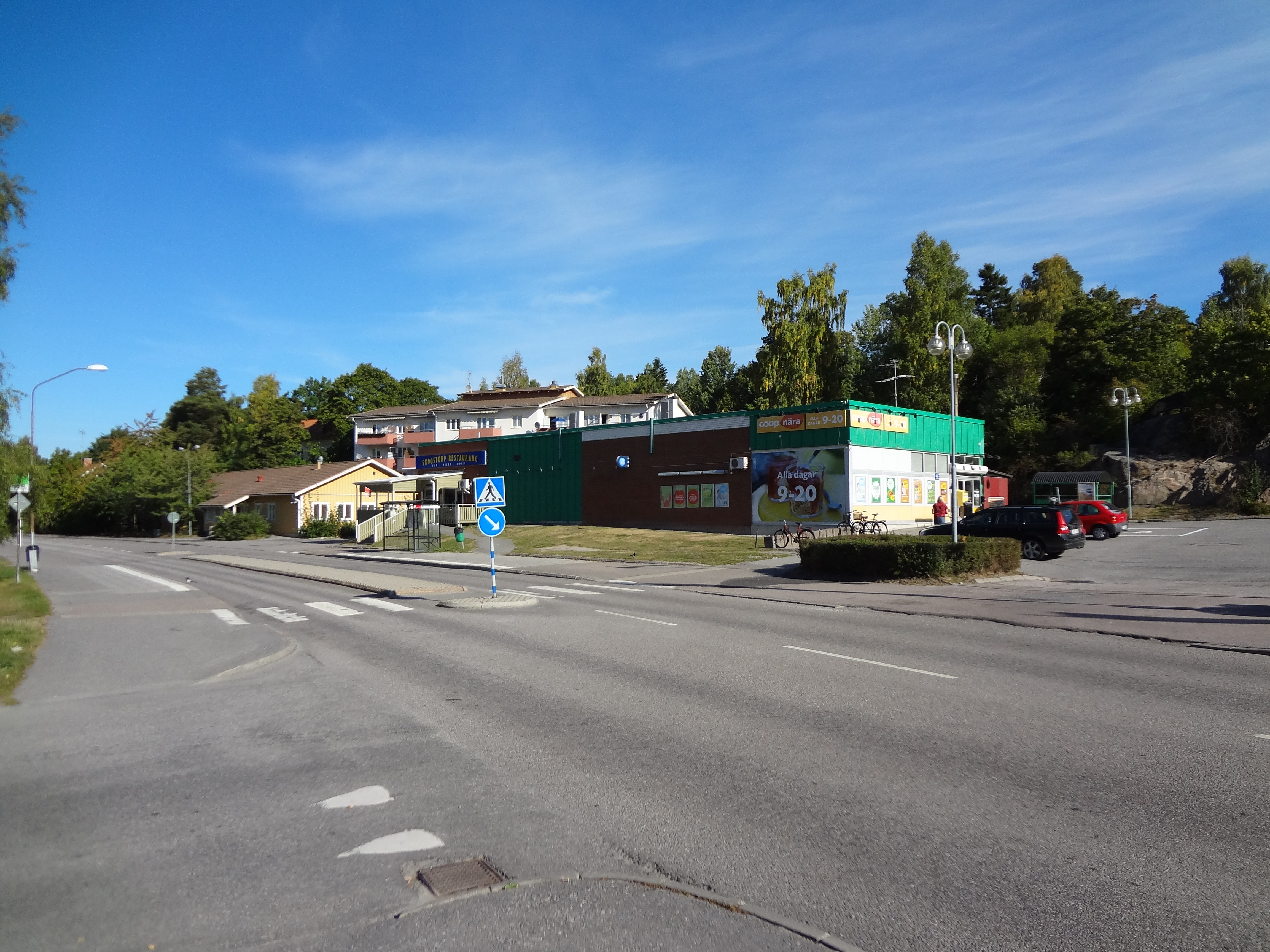 Butiken på Rosenforsvägen i Skogstorp.